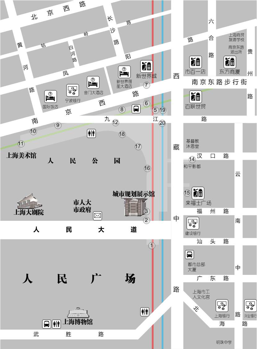 人民广场站街区图（彩色版）